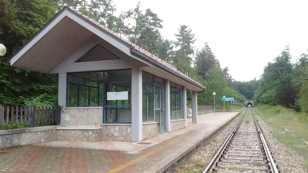 Stazione Campo di Giove Majella